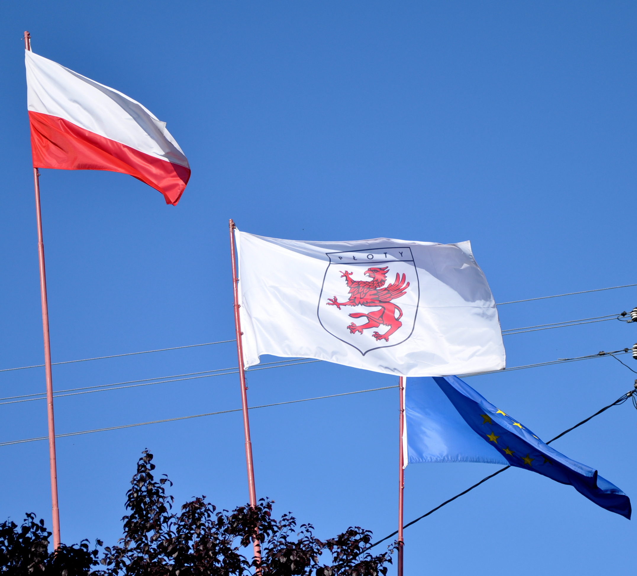 Herb Płotów na białym płótnie, przed urzędem miejskim